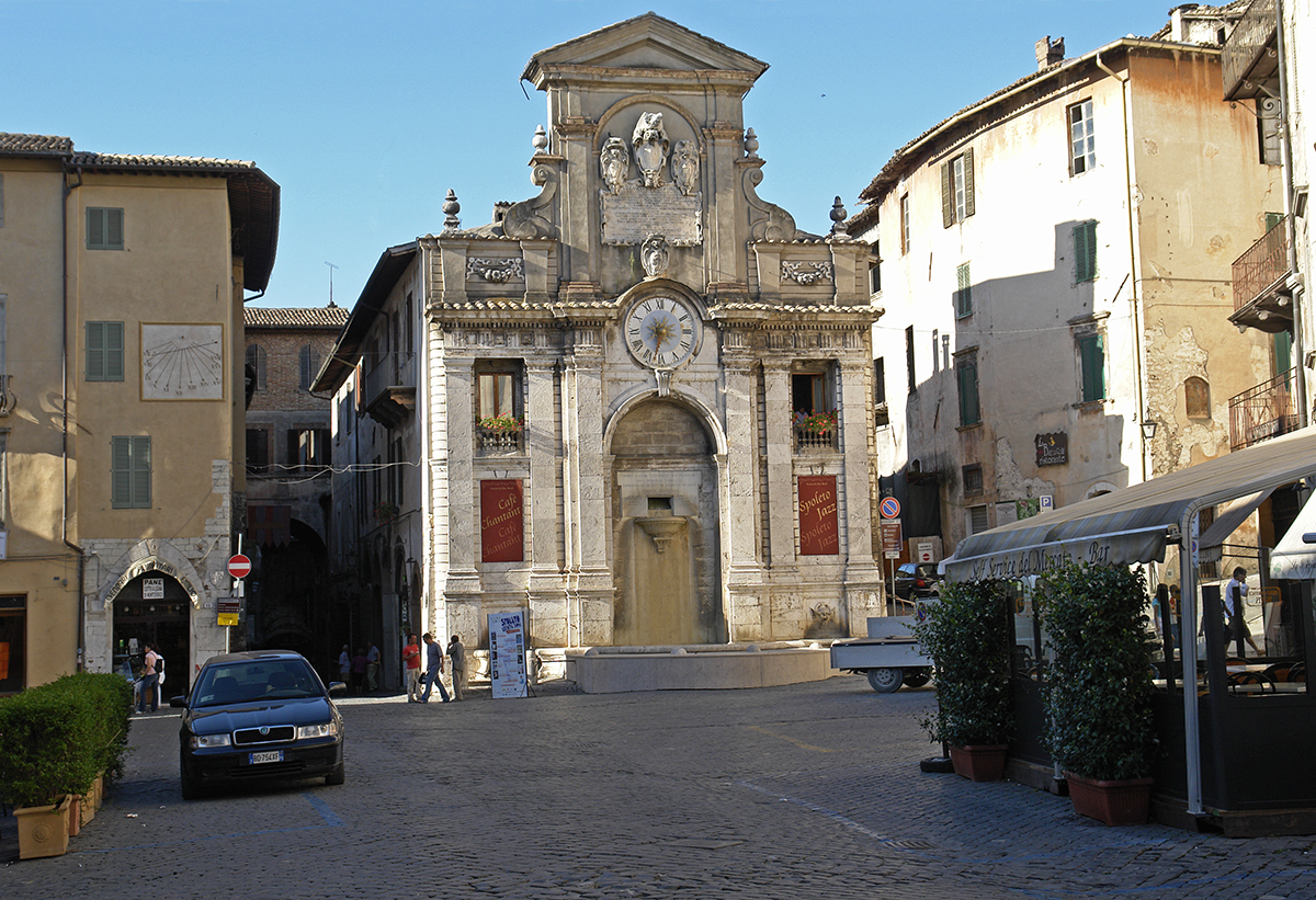 Marktplatz (Piazza del Mercato)